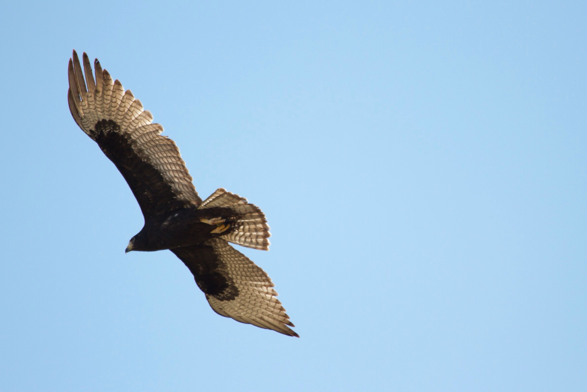 Zone-tailed Hawk Buteo albonotatus, juvenile, Lake Havasu NWR, Arizona